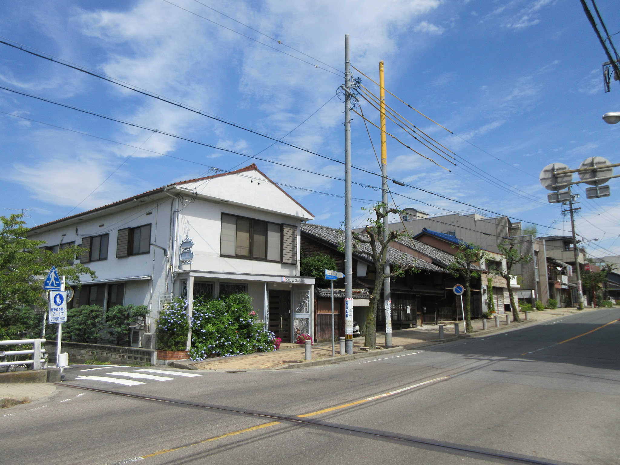 岡崎市材木町。木まち通り。